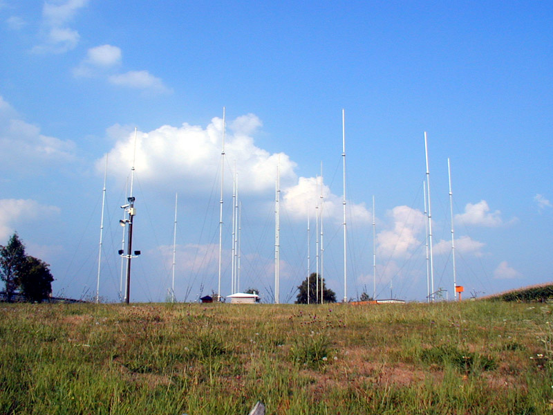 Bockhacken (Empfangsanlage), Hückeswagen, 2003 selbst fotografiert, GFDL